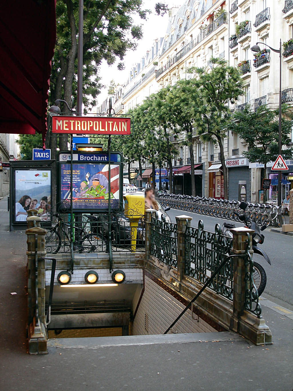 Station Brochant, de la ligne 13 du métro de Paris, France.